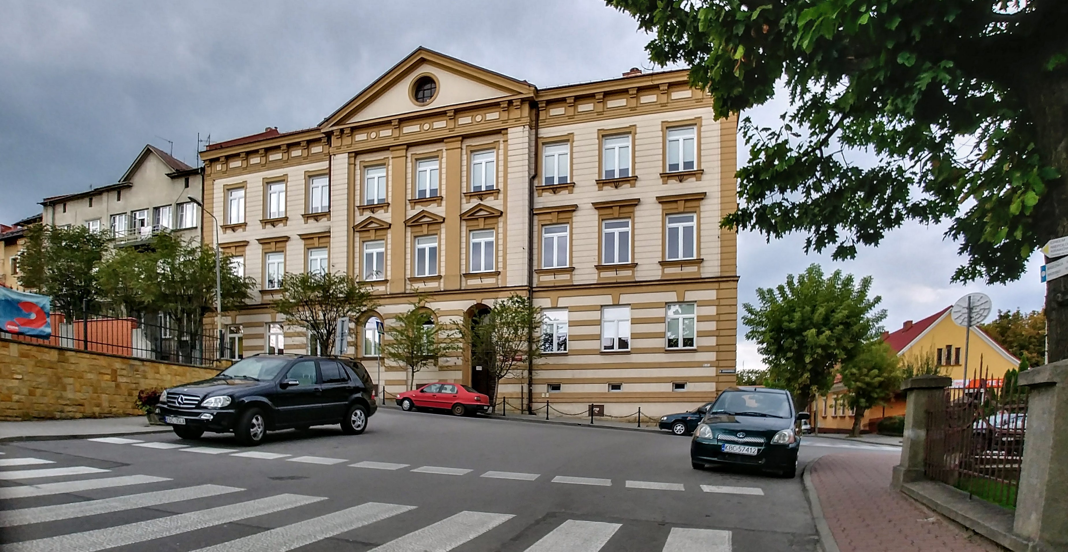 Budynek Gimnazjum nr 1 w Bochni.